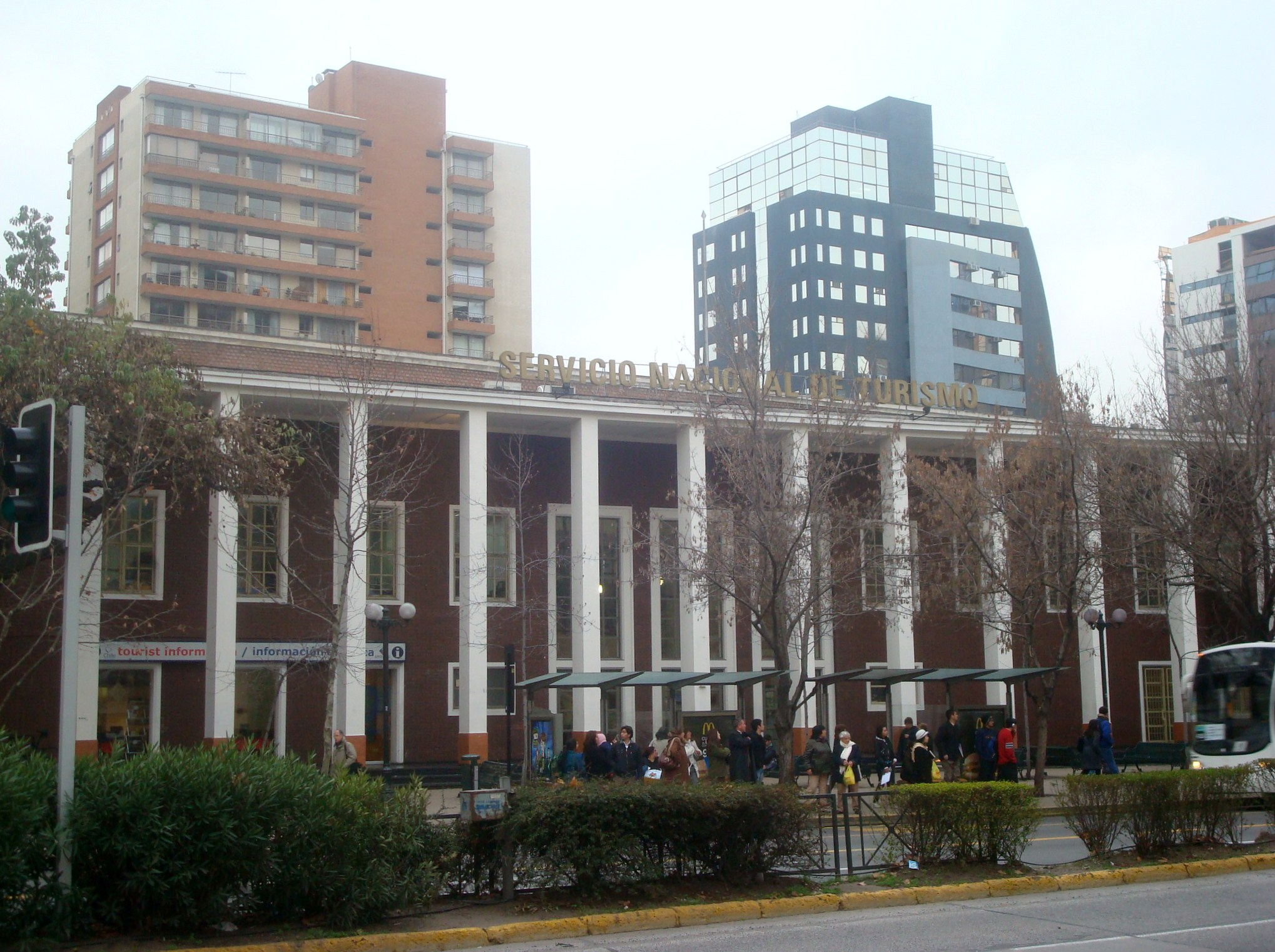 Dirección Nacional del Servicio Nacional de Turismo, Providencia, Santiago de Chile